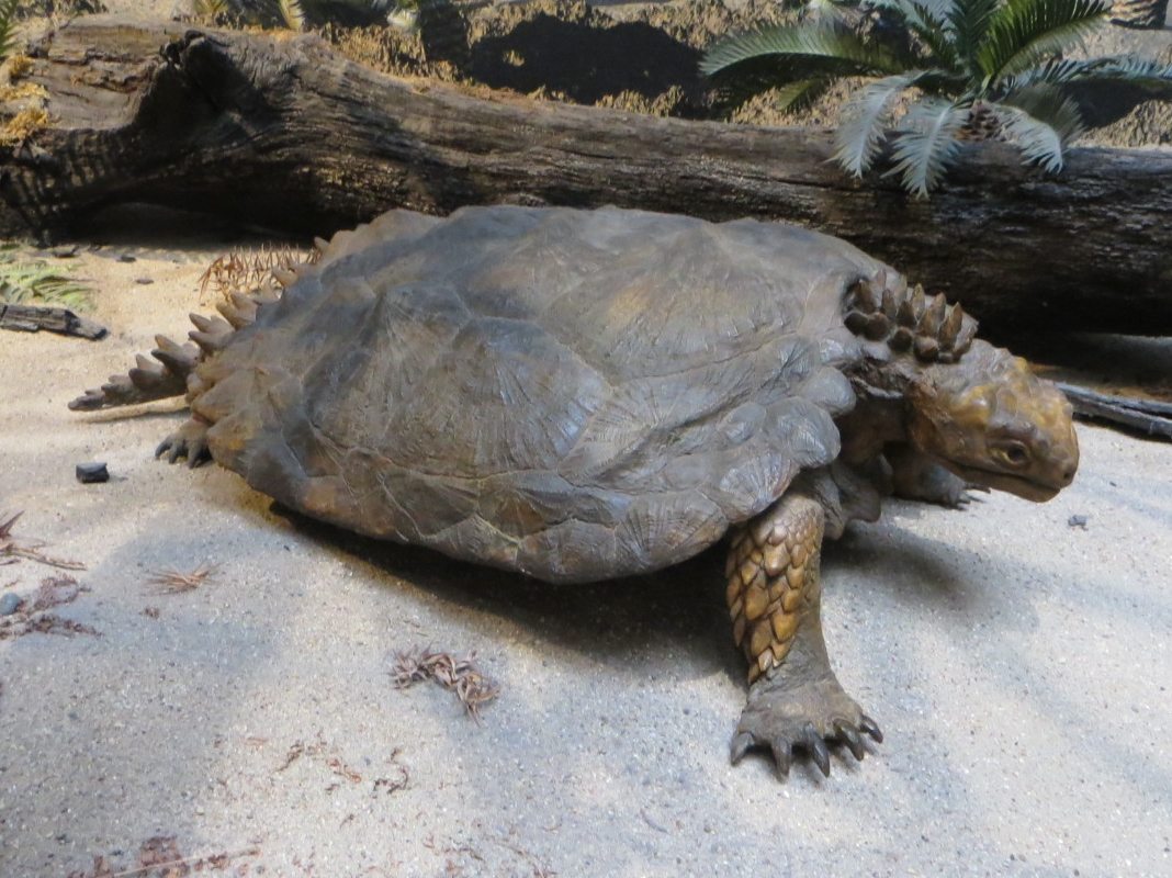 Model of Proganochelys- Took the picture at Museum am Lowentor, Stuttgart